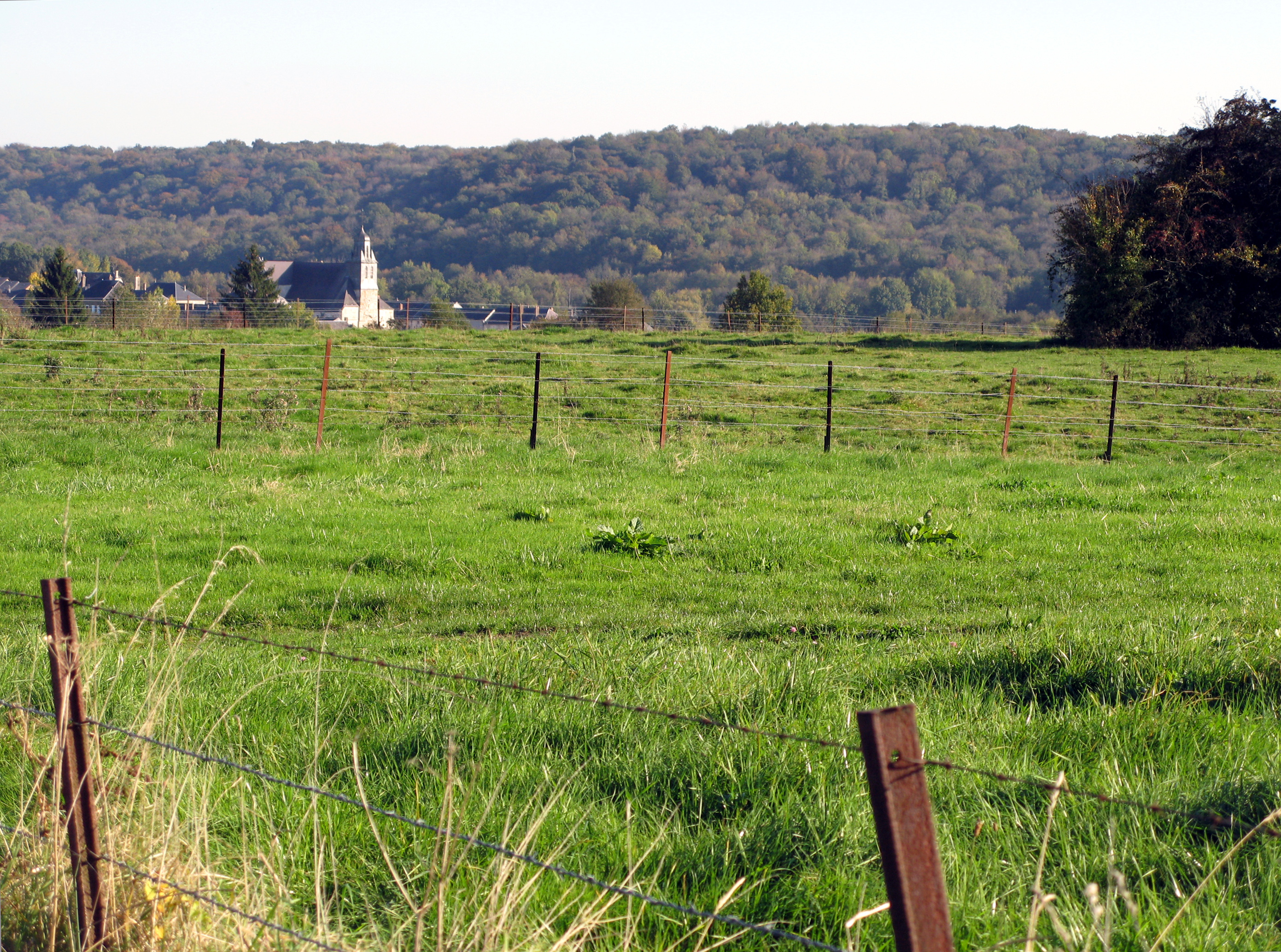 Launois-sur-Vence (Ardennes, France) - L'église aperçue depuis la route de Dommery.